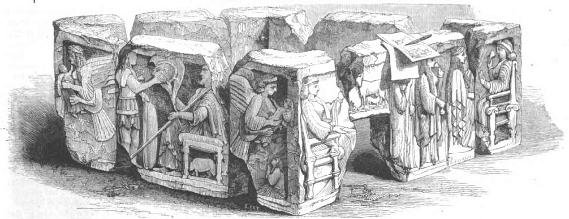 Ein Grabmal aus Xanthus.